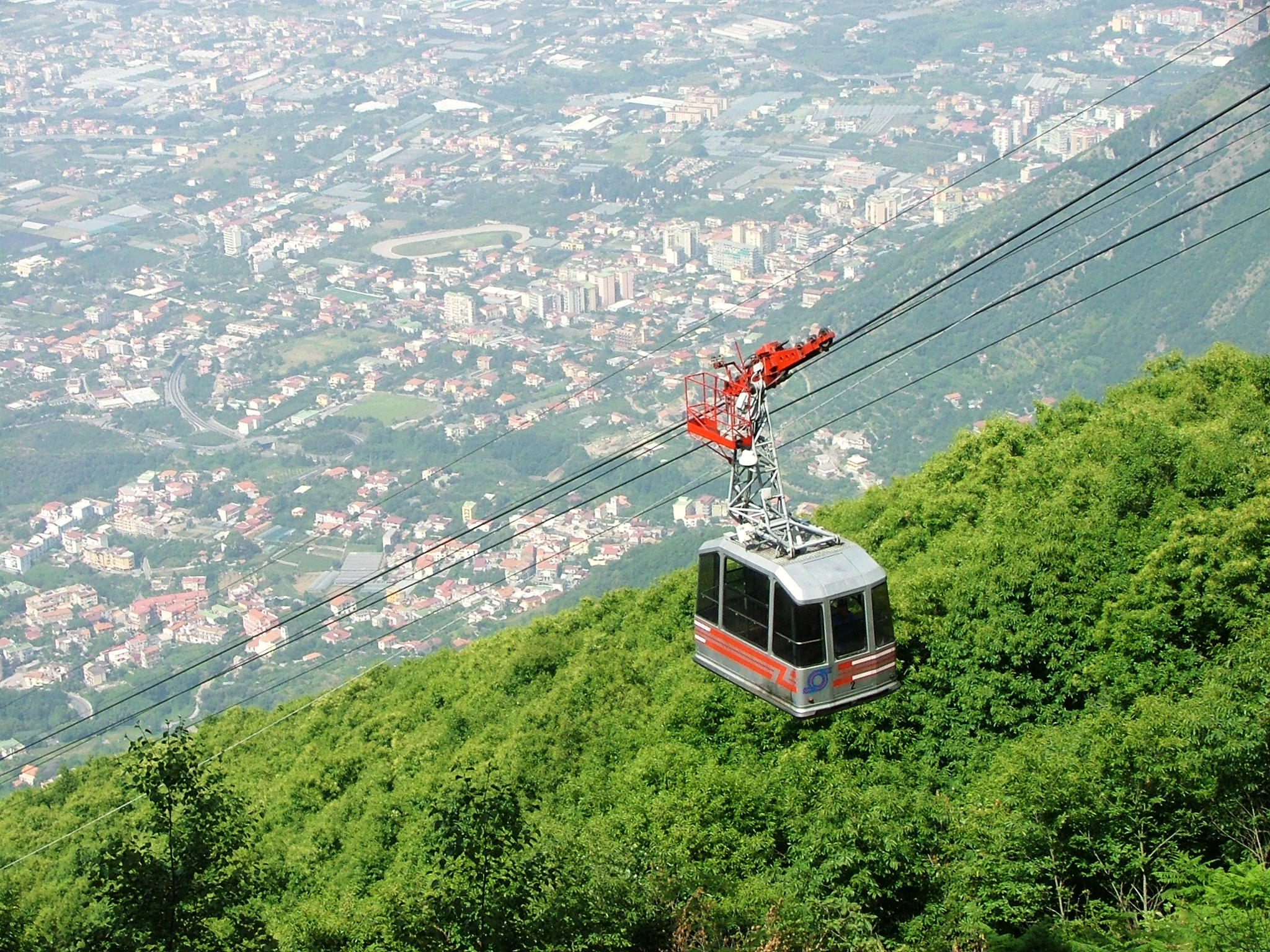 Kolej linowa na Monte Faito.